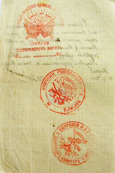 Документ на на Скопски революционен окръг на ВМОРО.